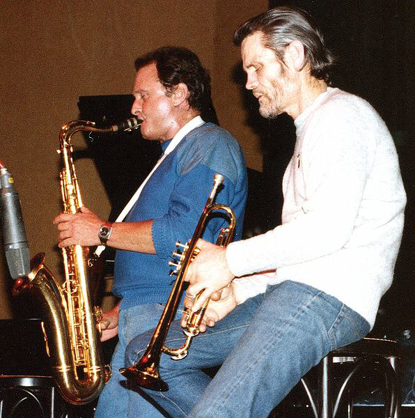 Stan Getz and Chet Baker performing in Sandvika, Norway, February 1983.